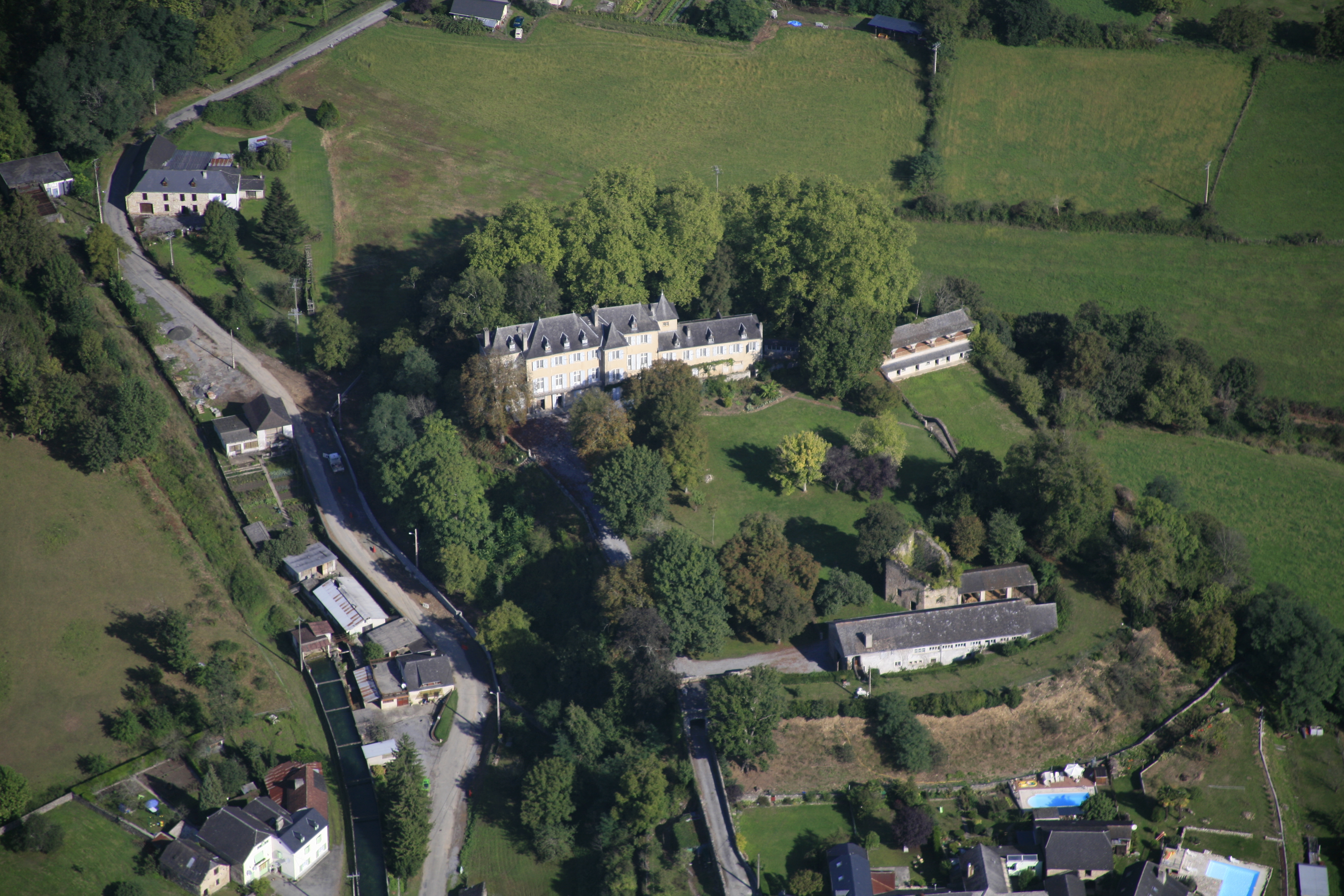 Castillo